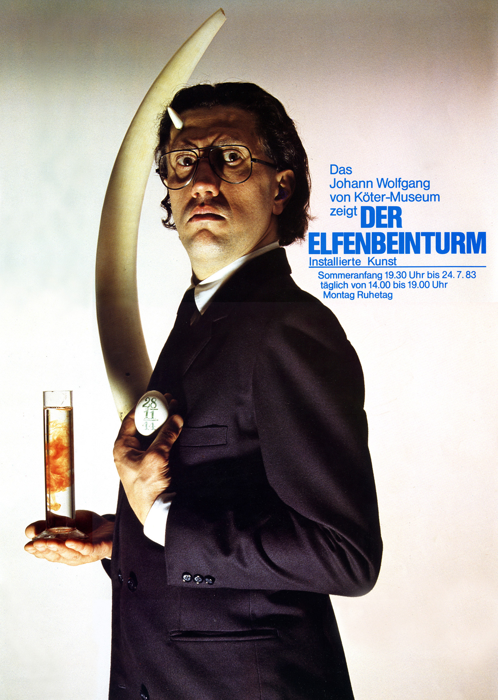 1983 - Außenwerbung und Einladung, Fotografie von Thomas Diercks, Entwurf und Design von Dieter Gerschler